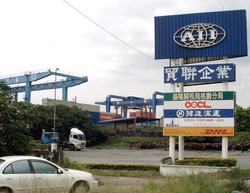 中文（台灣）: 內壢貿聯倉儲。